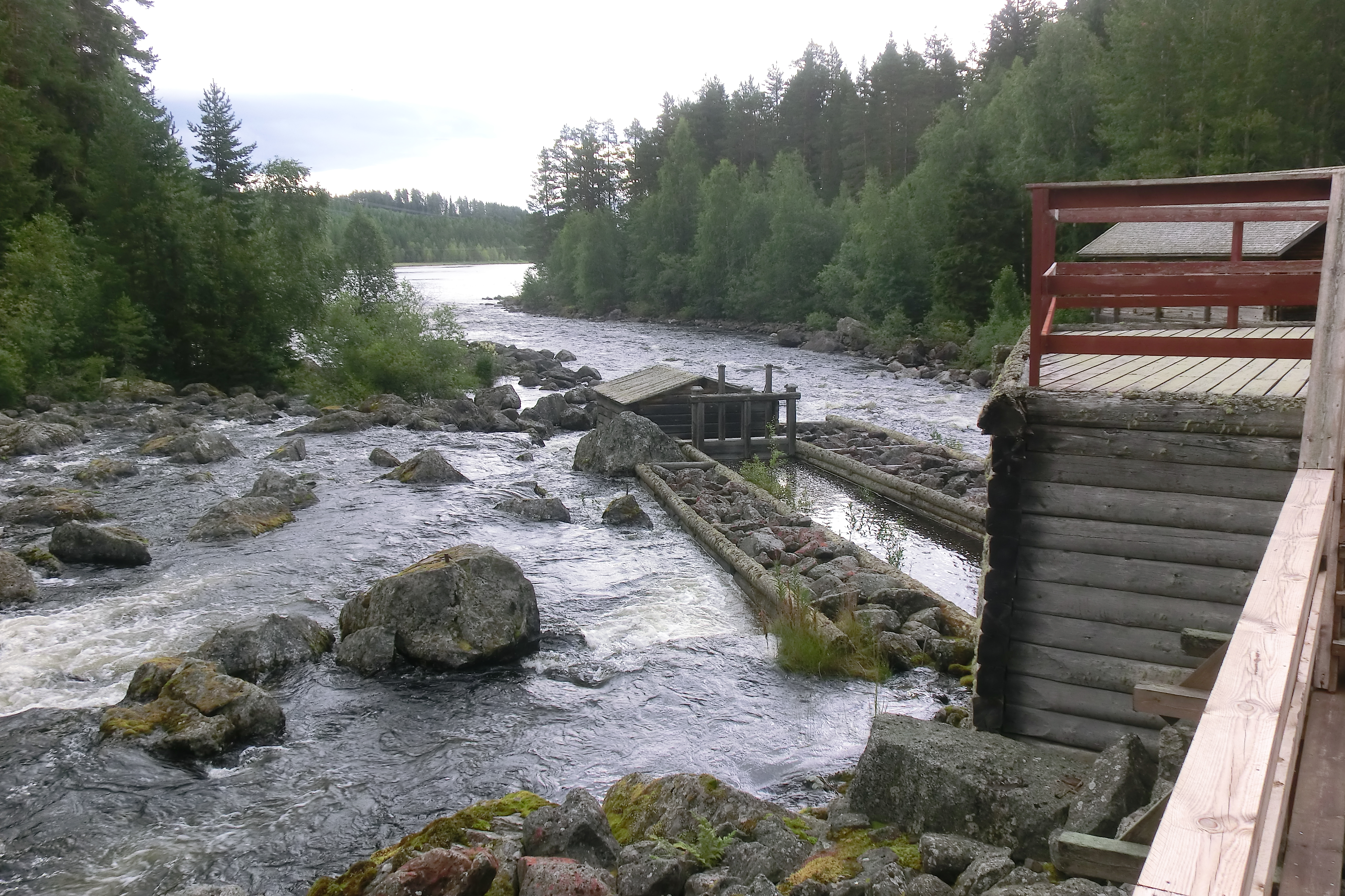 Kvarnströmmen i Haverö strömmar